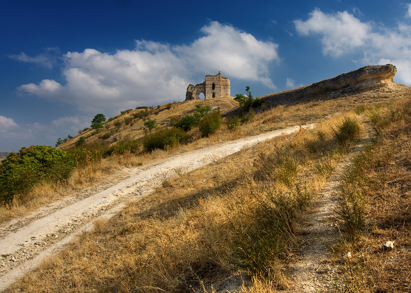 Castle at Matochina village, Bulgaria